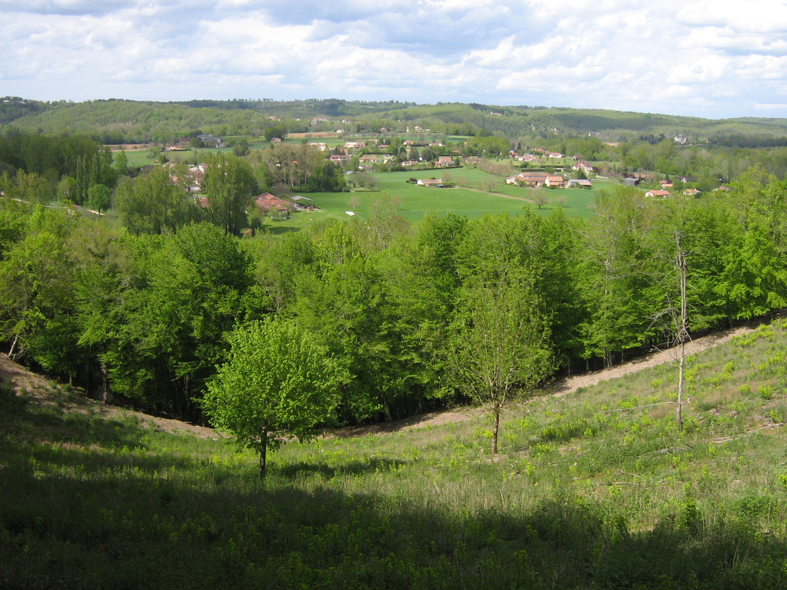 le change